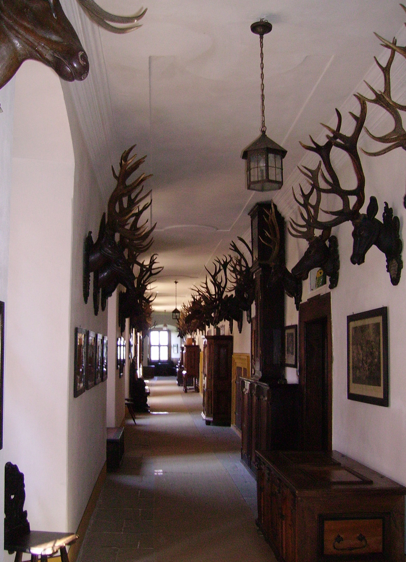 Greifenstein Castle near Heiligenstadt in (Franconia)